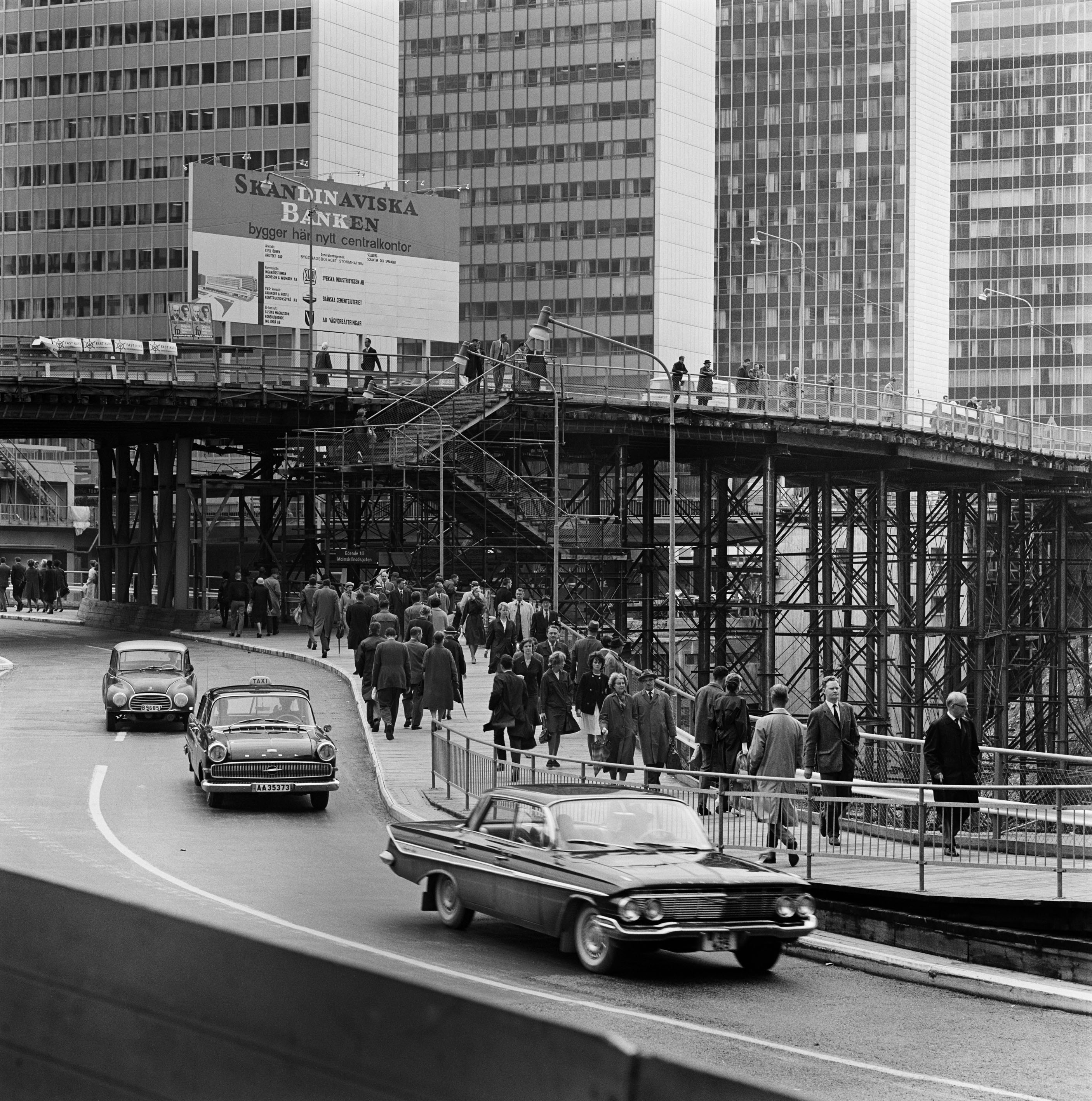 Hamngatan sedd mot Malmskillnadsgatans provisoriska bro. I fonden Hötorgshusen.